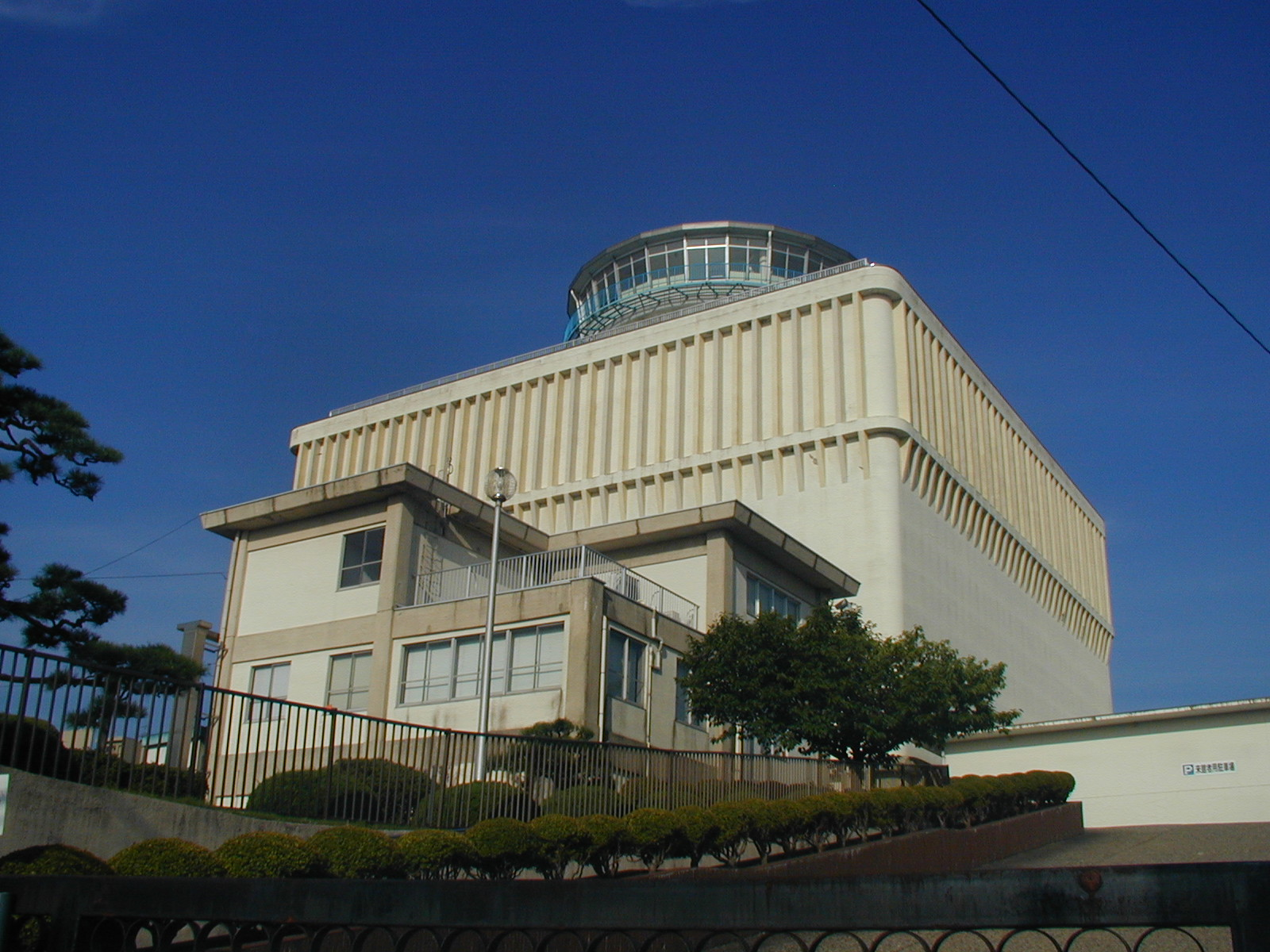 日本海タワー 2010年8月